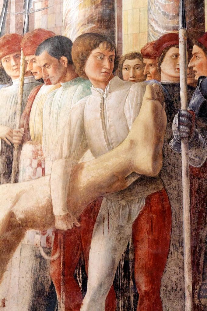 Hungarian: Trasporto del corpo di San Cristoforo decapitato